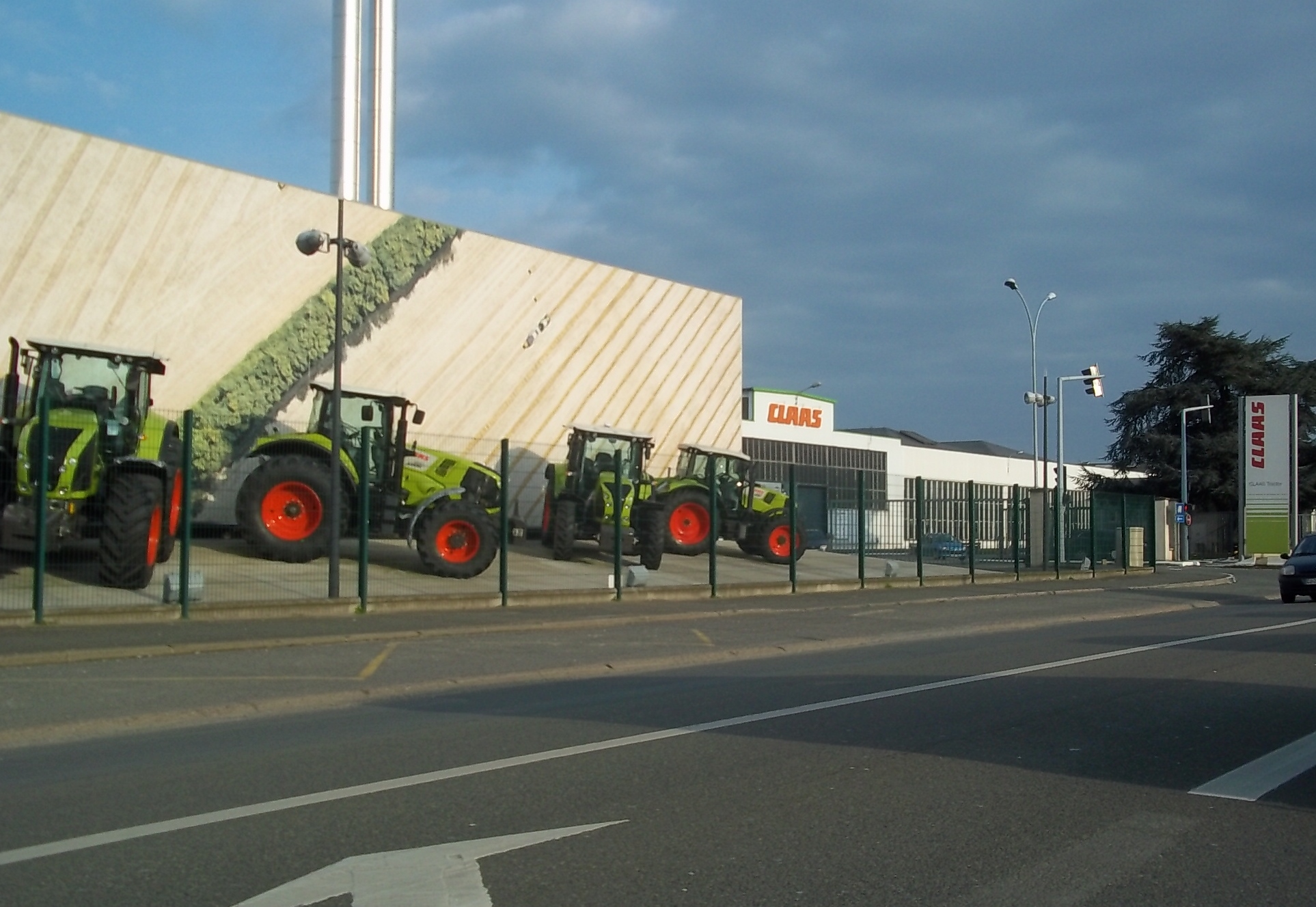 Entrée de l'usine Claas Tractors - Le Mans